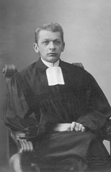 Adalbert Stromberg